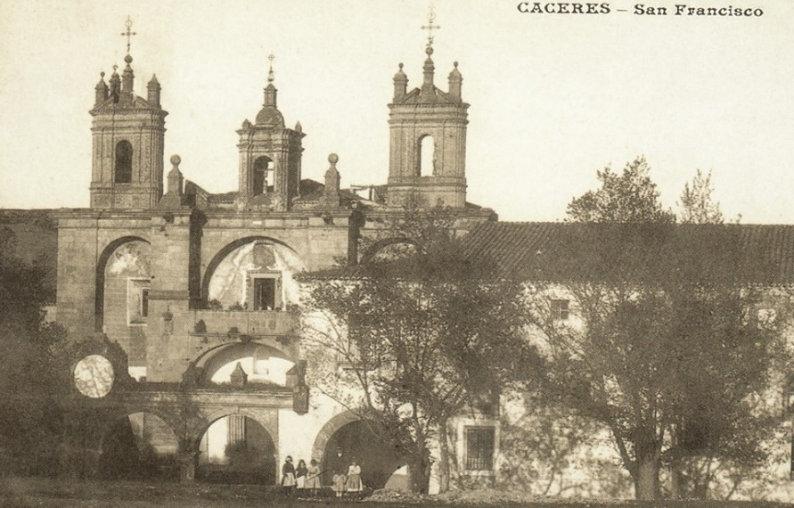 Monasterio de San Francisco el Real, Cáceres, España.